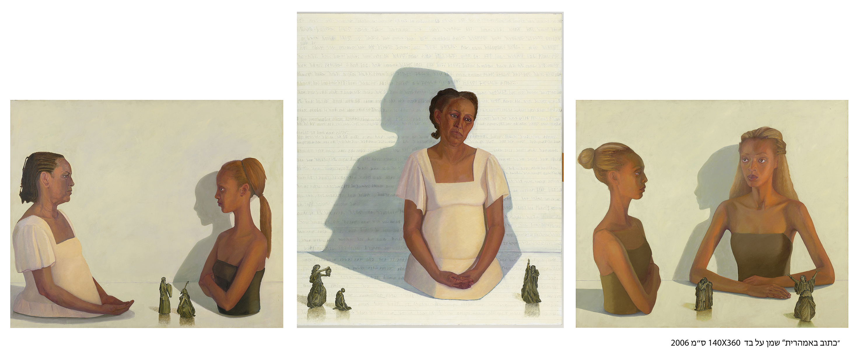 חוה ראוכר, "כתוב באמהרית", שמן על בד 140X360 ס"מ 2005-2006, צילום: אבי אמסלם Hava Rauchr Written In Amharic oil on canvasת140 on 360 xn 2006